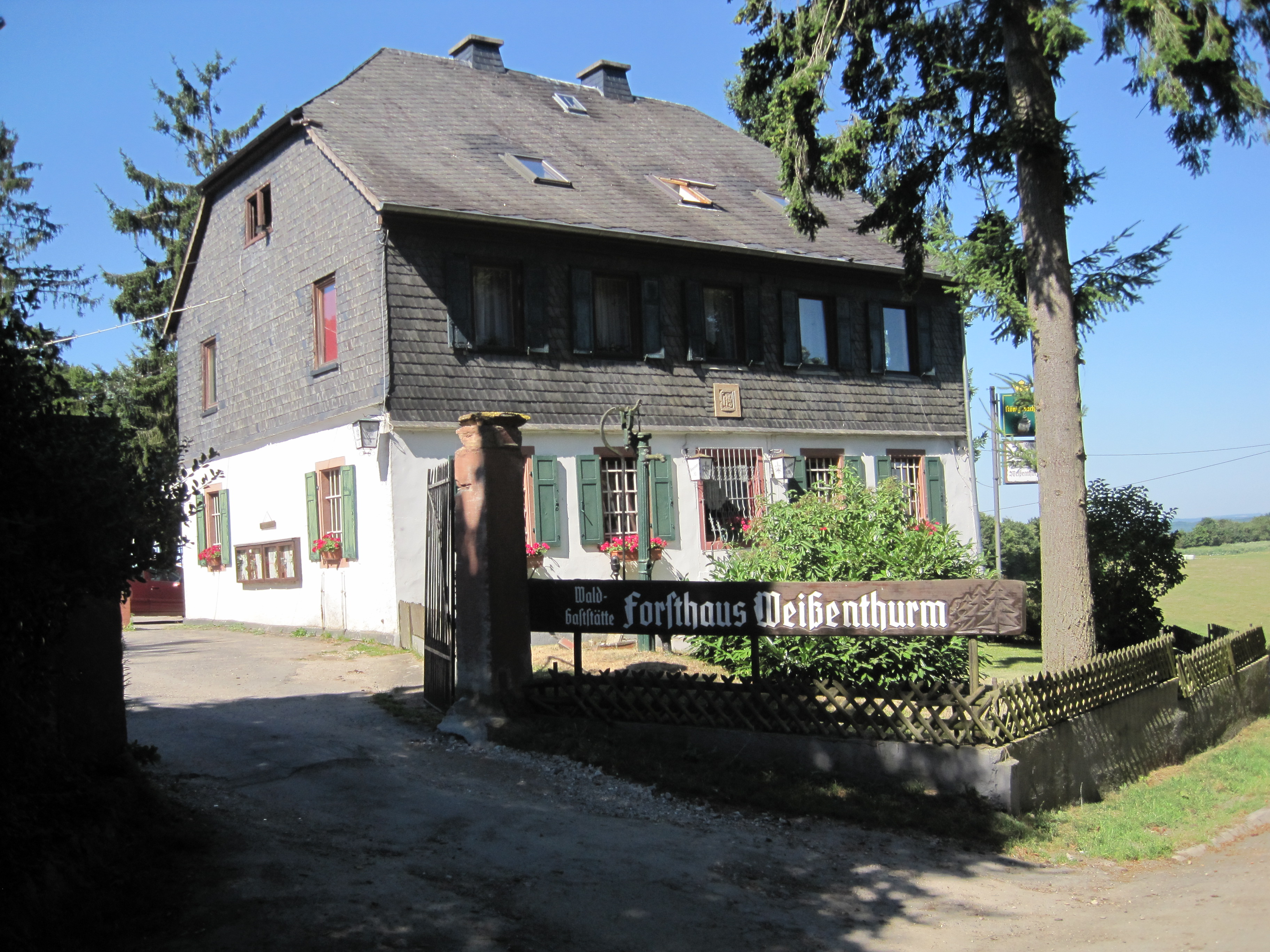 Ehemaliges Forsthaus Weißenthurm. Errichtet im 18. Jahrhundert, heute Gastronomie. Früherer Standort des Bollwerks Weißer Thurm des Rheingauer Gebücks. Das Bollwerk besaß einen Turm, der 1816 abgebrochen wurde. Presberg im Rheingau, Hessen.